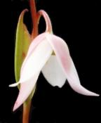 Fleur d'Heliamphora heterodoxa x minor